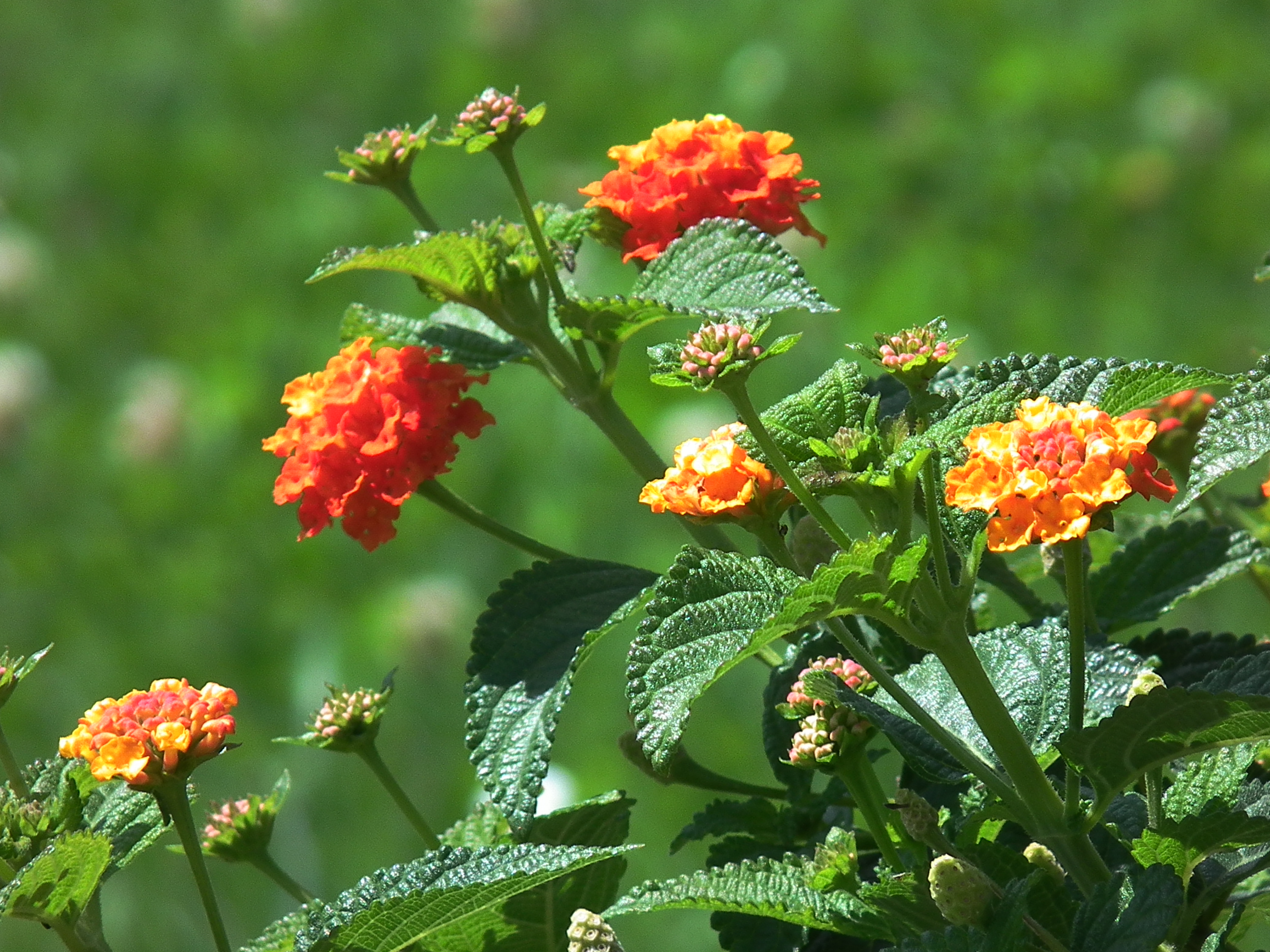 Wandelröschen (Lantana camara) und Tagetes (Tagetes), fotografiert in Landau (Rheinland-Pfalz, Deutschland)